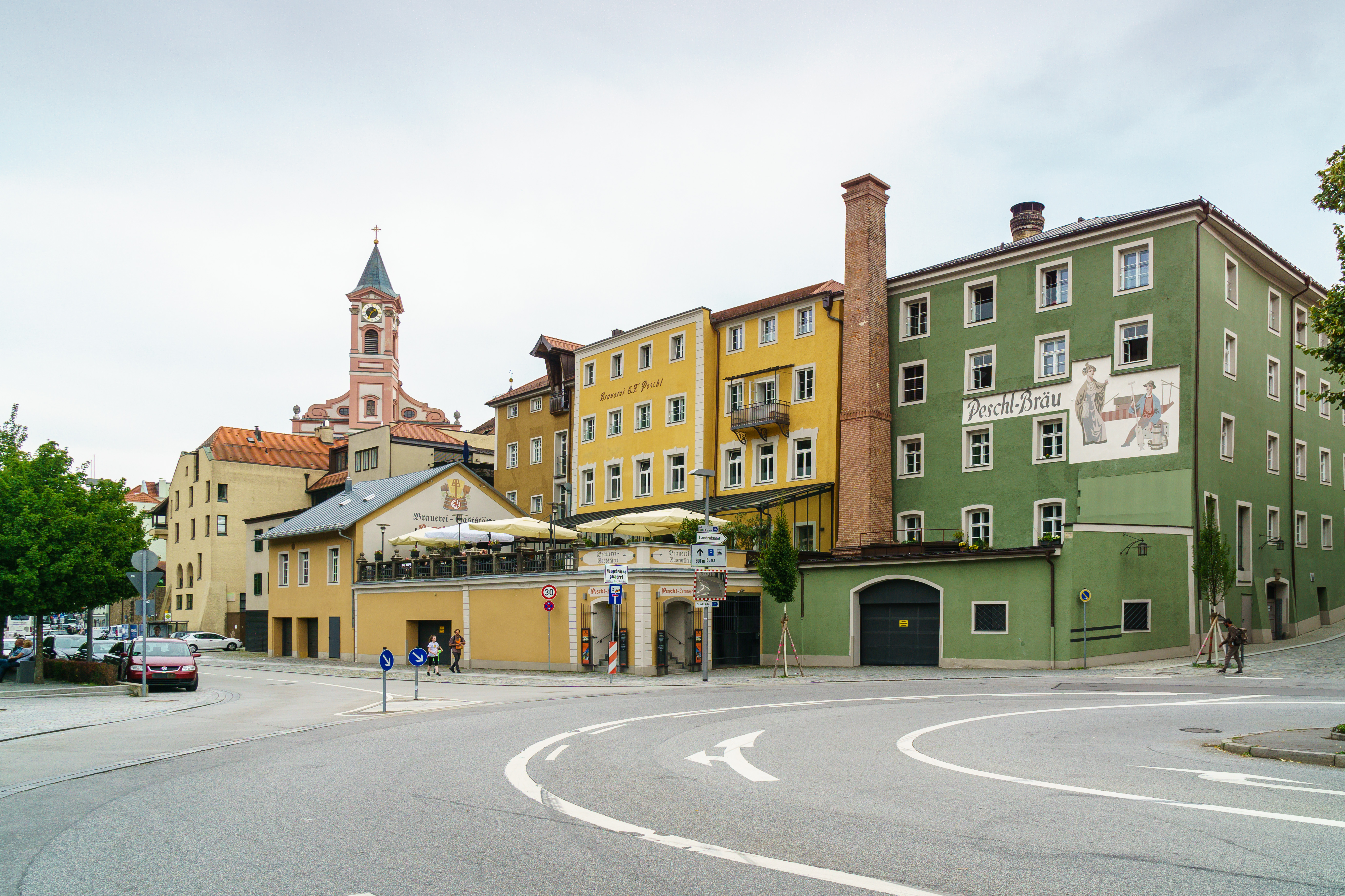 Peschl-Bräu (auch Brauerei E. F. Peschl), Roßtränke 6 in Passau (War die älteste Brauerei Passaus, Produktion 2008 eingestellt)